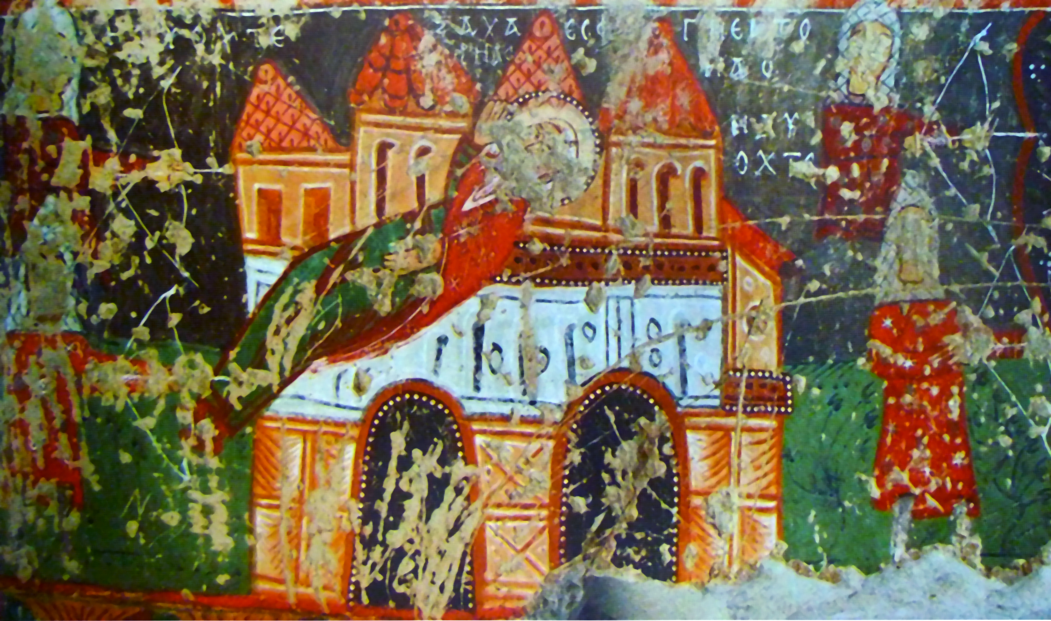 Kappadókia/Göreme Nemzeti Park: Szent Eustachius-kápolna freskója